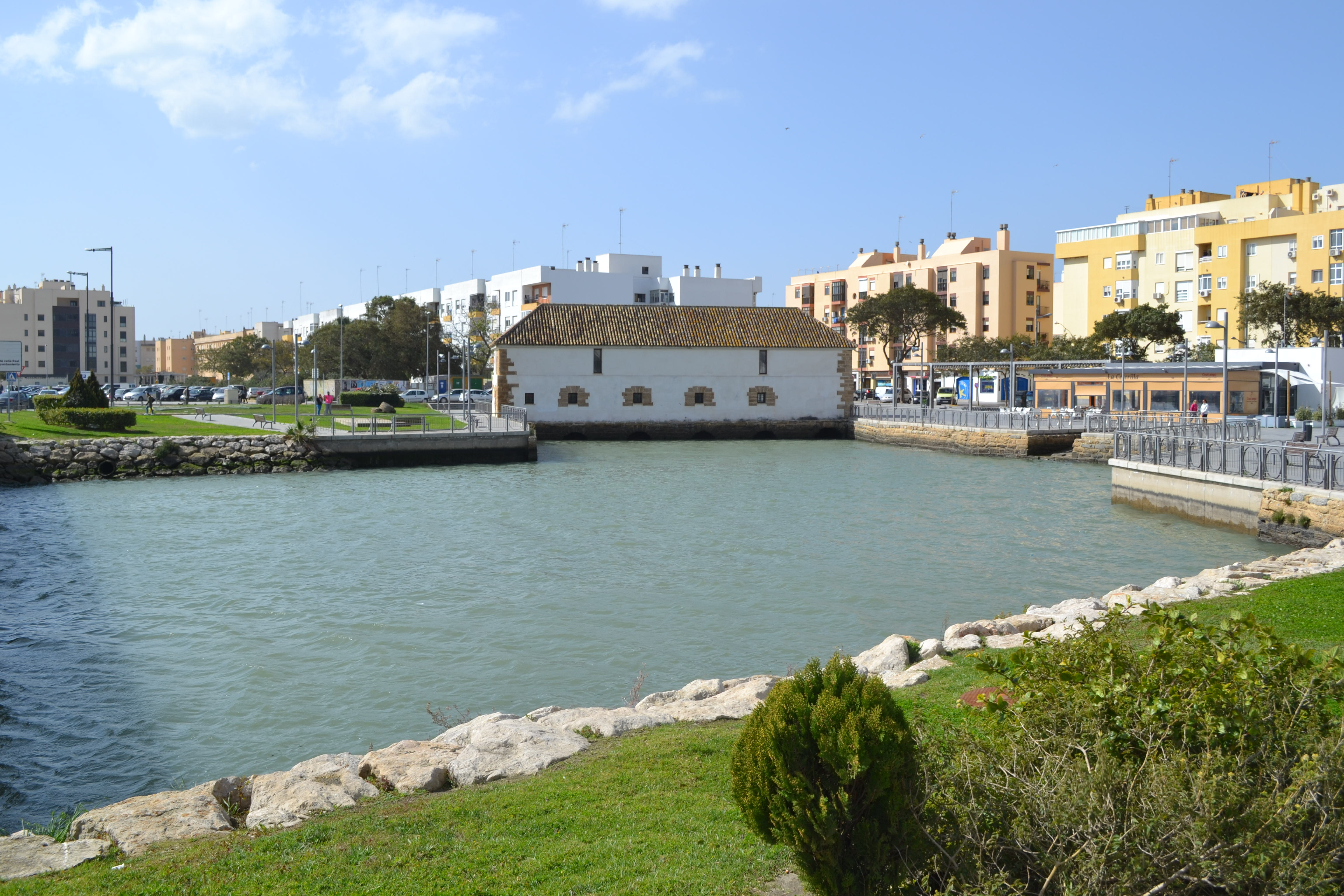 Vista del molino de marea en el caño del Zaporito, en San Fernando (Cádiz)